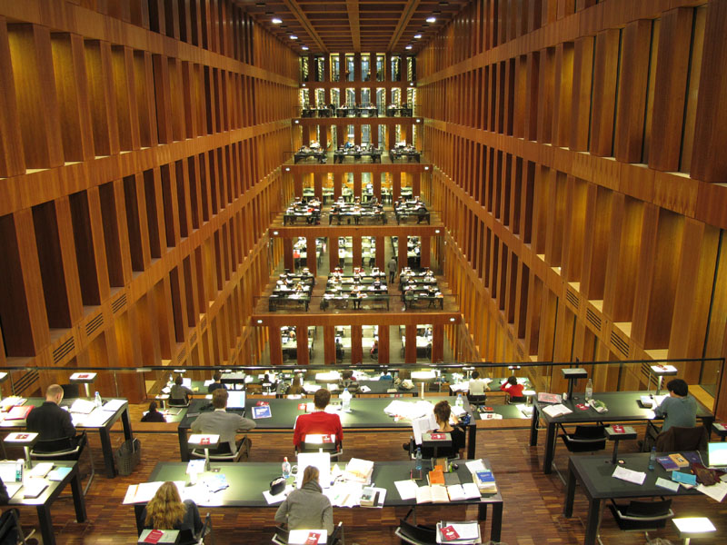 Jacob-und-Wilhelm-Grimm-Zentrum, Leseterrassen während der Öffnungszeiten